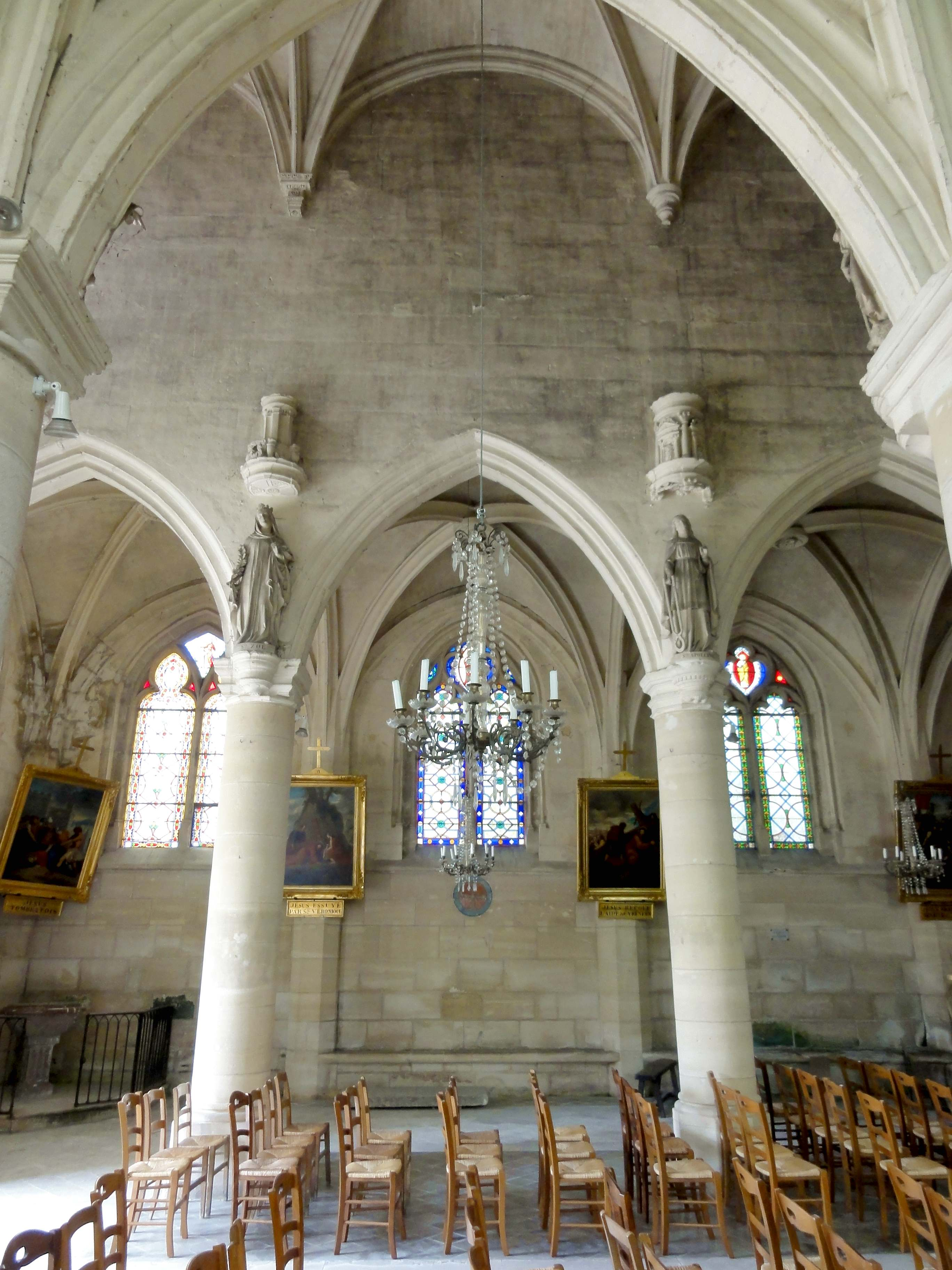 Intérieur de l'église (voir titre).